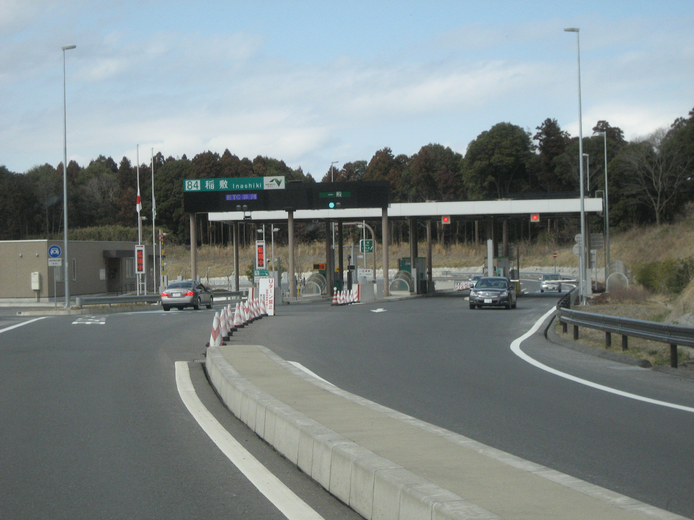 首都圏中央連絡自動車道稲敷IC料金所